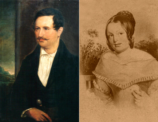 Porträt von Károly Maderspach (1791-1849)und seiner Ehefrau Franziska, geb. Buchwald (1804-1880)